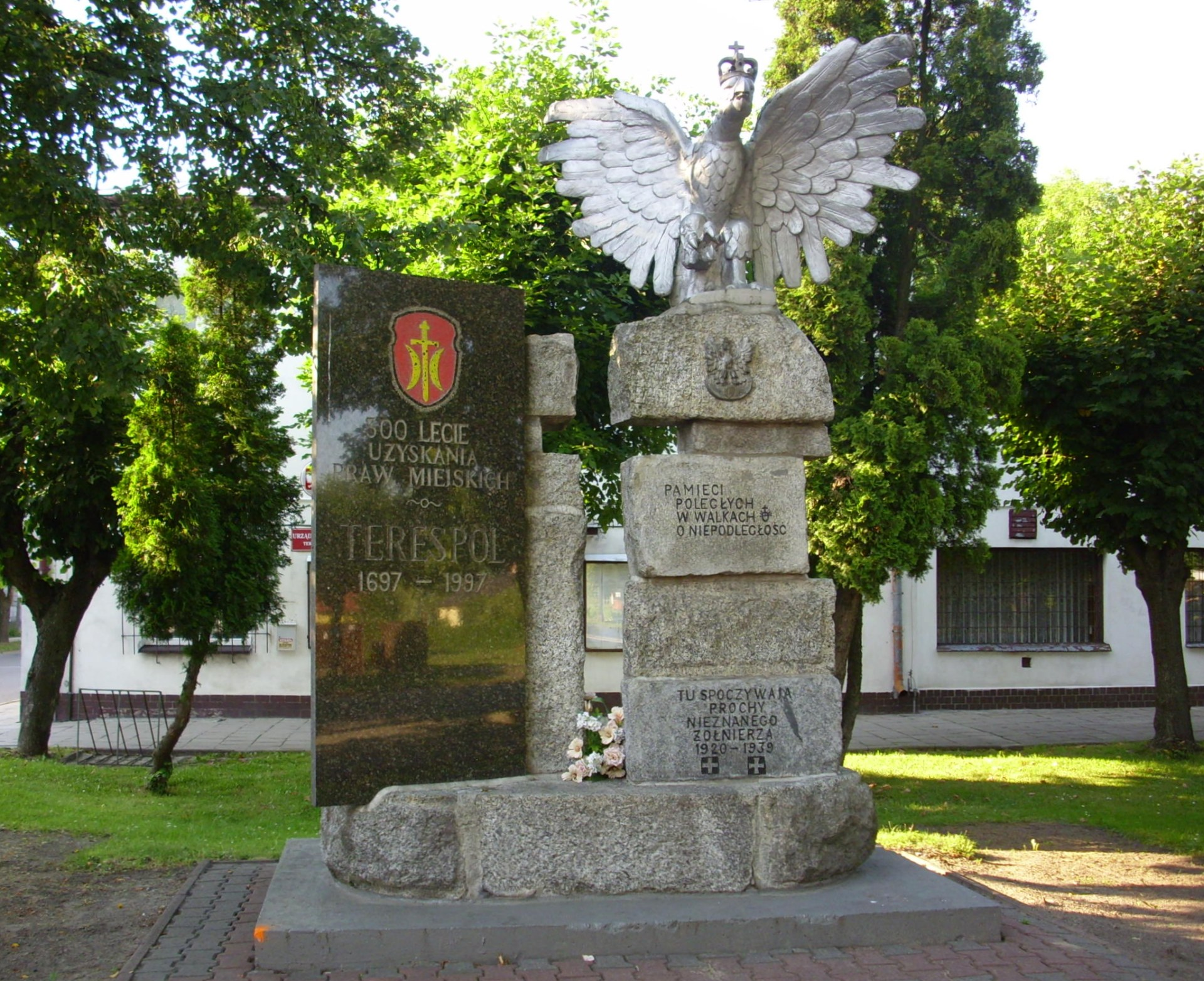 Terespol. Multipomnik Niepodległości.